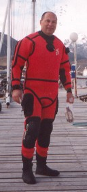 Traje seco. Ushuaia 2002